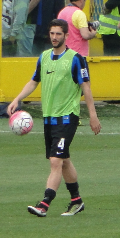 Roberto Gagliardini, calciatore italiano